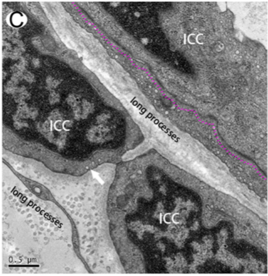 Figura 6. (C) Las ICC presentan largas prolongaciones. De vez en cuando estaban involucrados en sinapsis multicontactos con otras ICC (línea de puntos rosa). Barr= 0.5 um